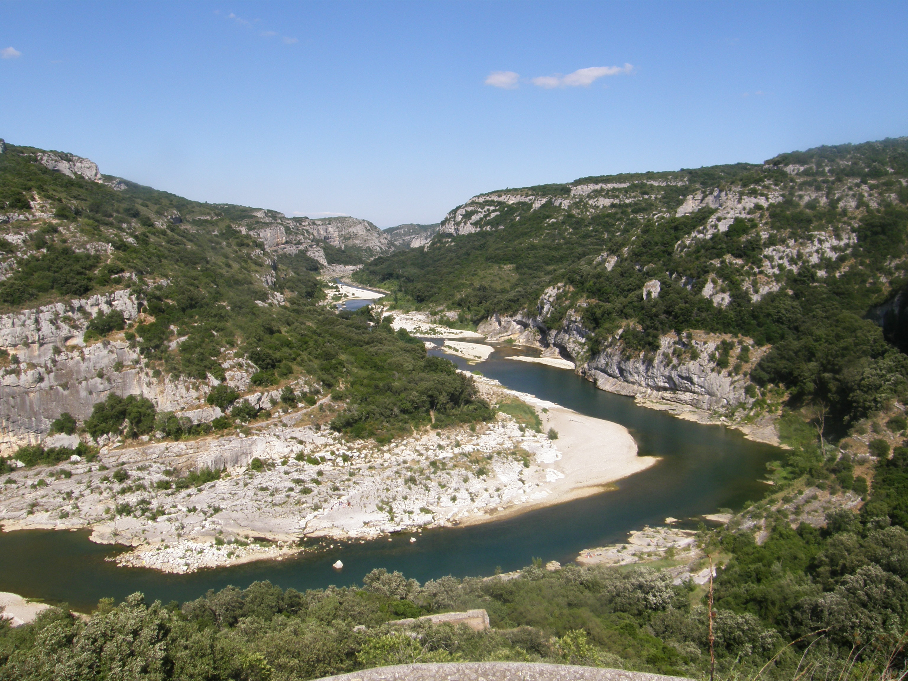 Gorges du Gardon dans le sud-est de la commune de Sanilhac-Sagriès (Gard, France). Vue vers l'est et vers l'aval depuis la Baume, rive droite. Immédiatement à gauche de la photo, de l'autre côté de la rivière, se trouve Saint-Vérédème.